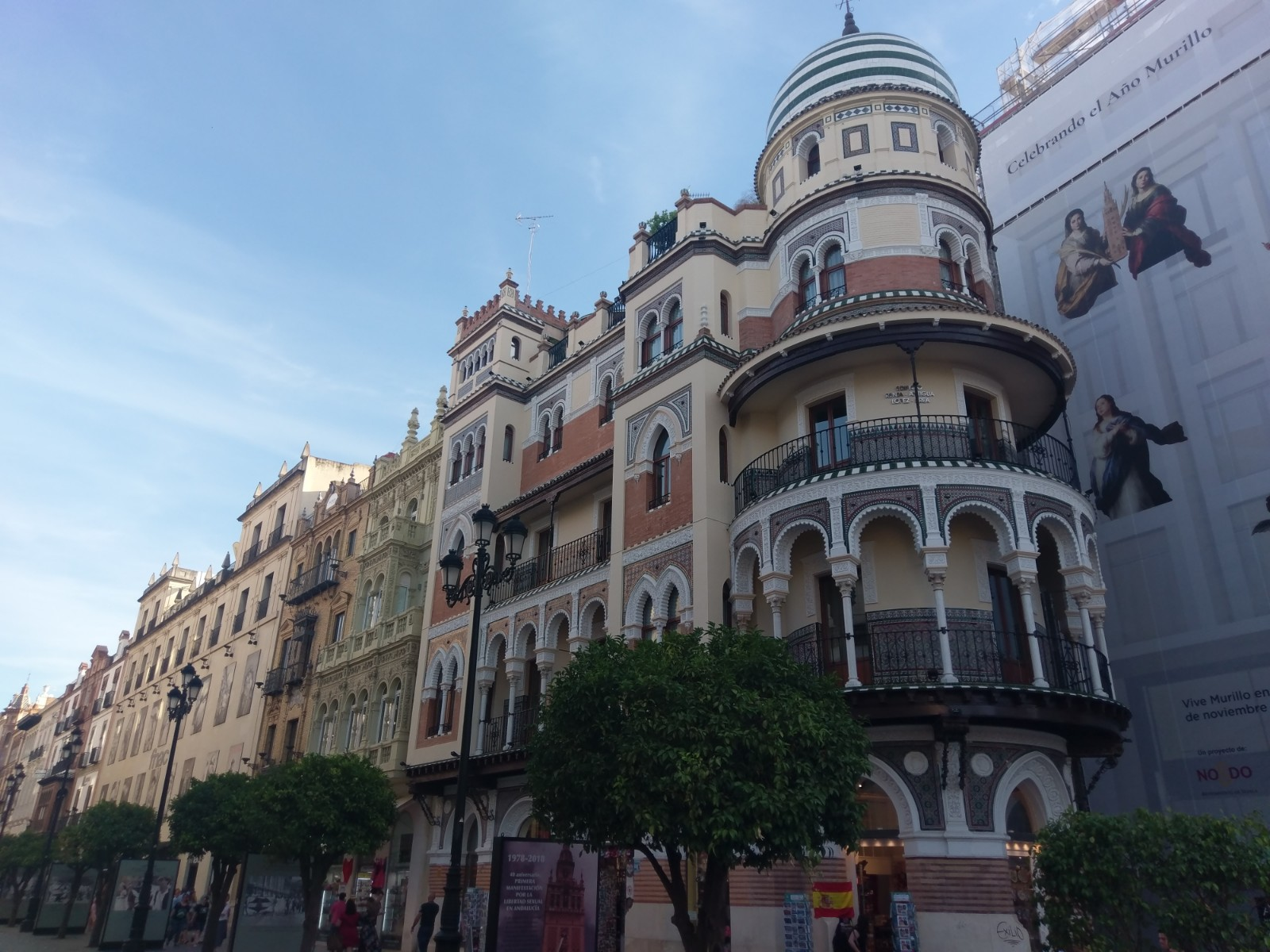 ארכיטקטורה בעלת סממנים מוסלמיים במרכז ההיסטורי של סביליה